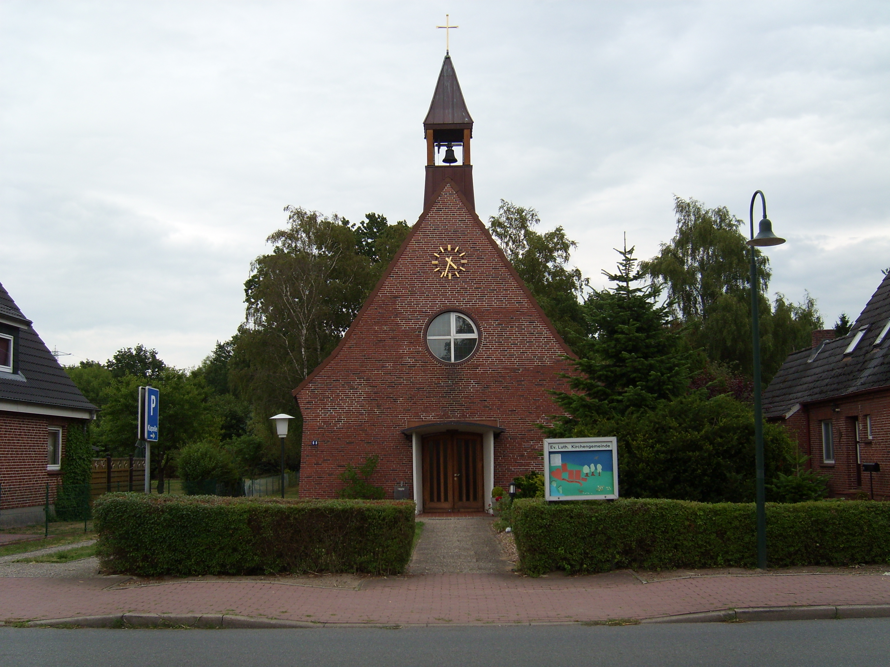 Die Johanniskirche in Kremperheide, Dorfstraße 68